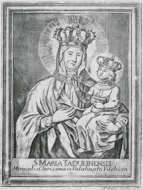 Беларуская (тарашкевіца): Маці Божая Тадулінская (Maci Božaja Tadulinskaja). Абраз